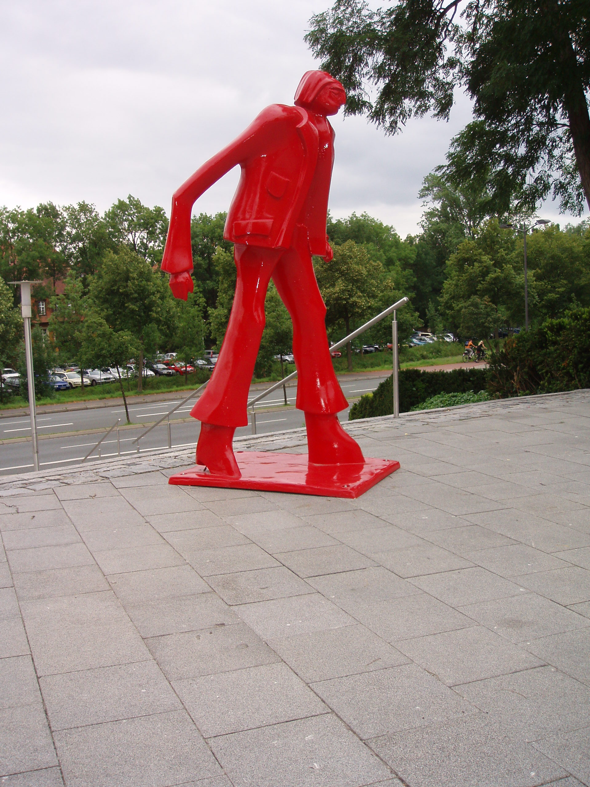 Plastik von Kurt Laurenz Metzler